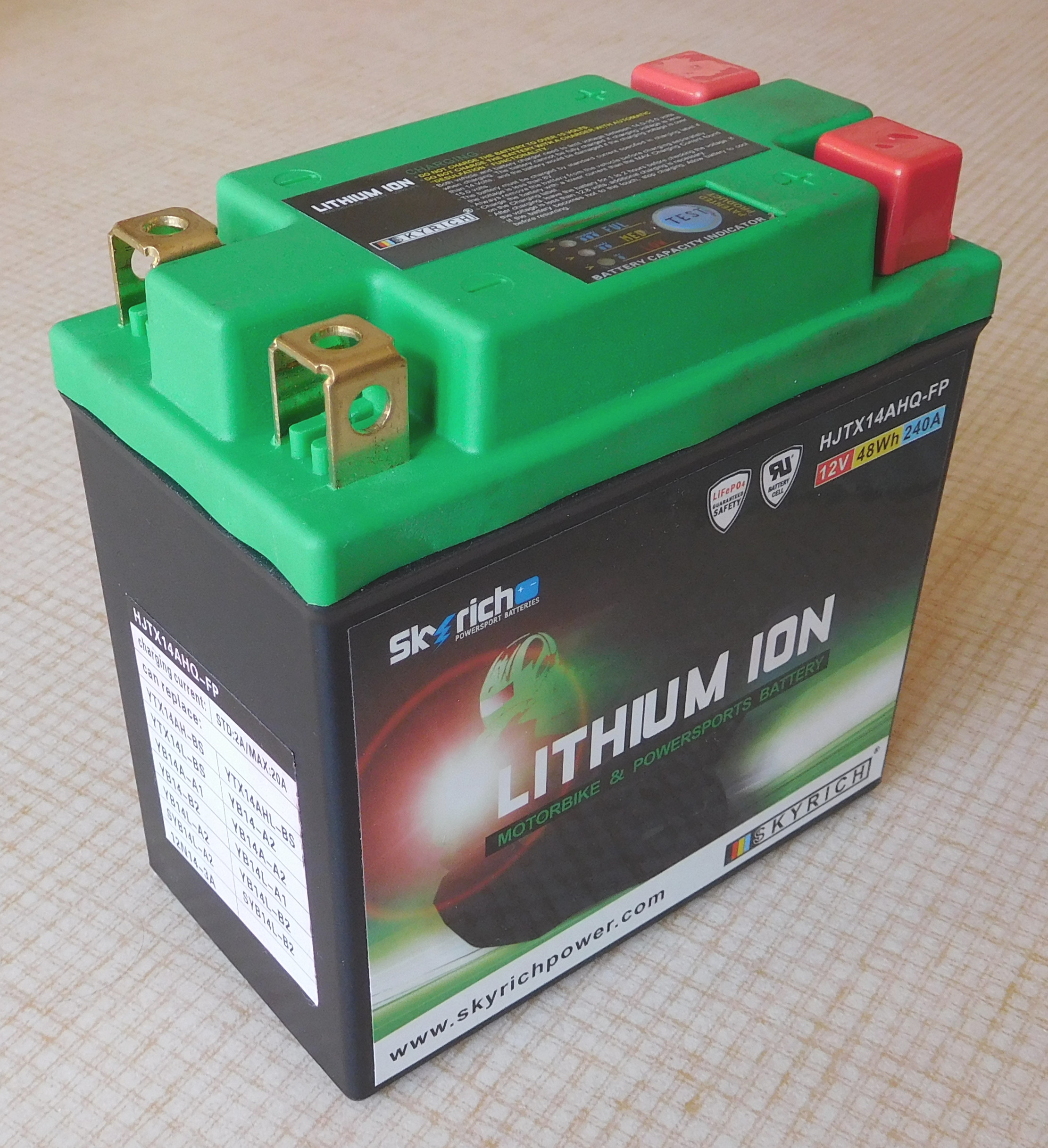 Batterie moto lithium-fer-phosphate (LFP) Skyrich, réversible (à 4 bornes), tension 12 V, énergie 48 Wh, avec indicateur de charge, courant de charge de 2 à 20 A, poids 0,92 kg.